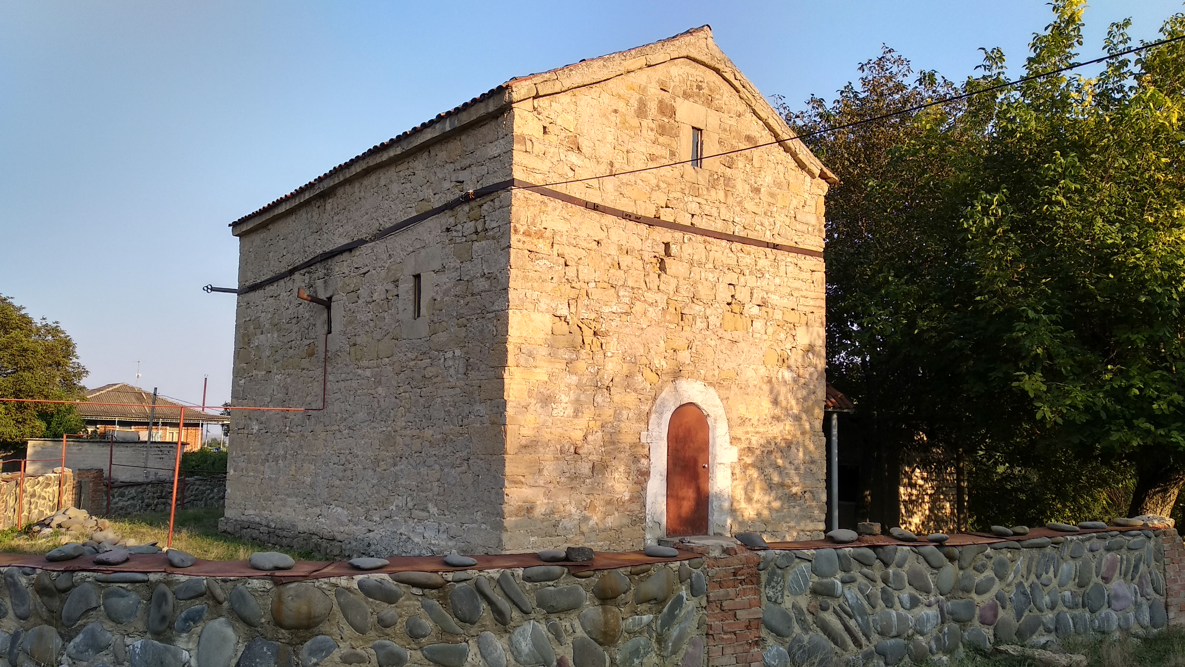 საციხურის წმინდა გიორგის ეკლესიის დასავლეთ კედელი